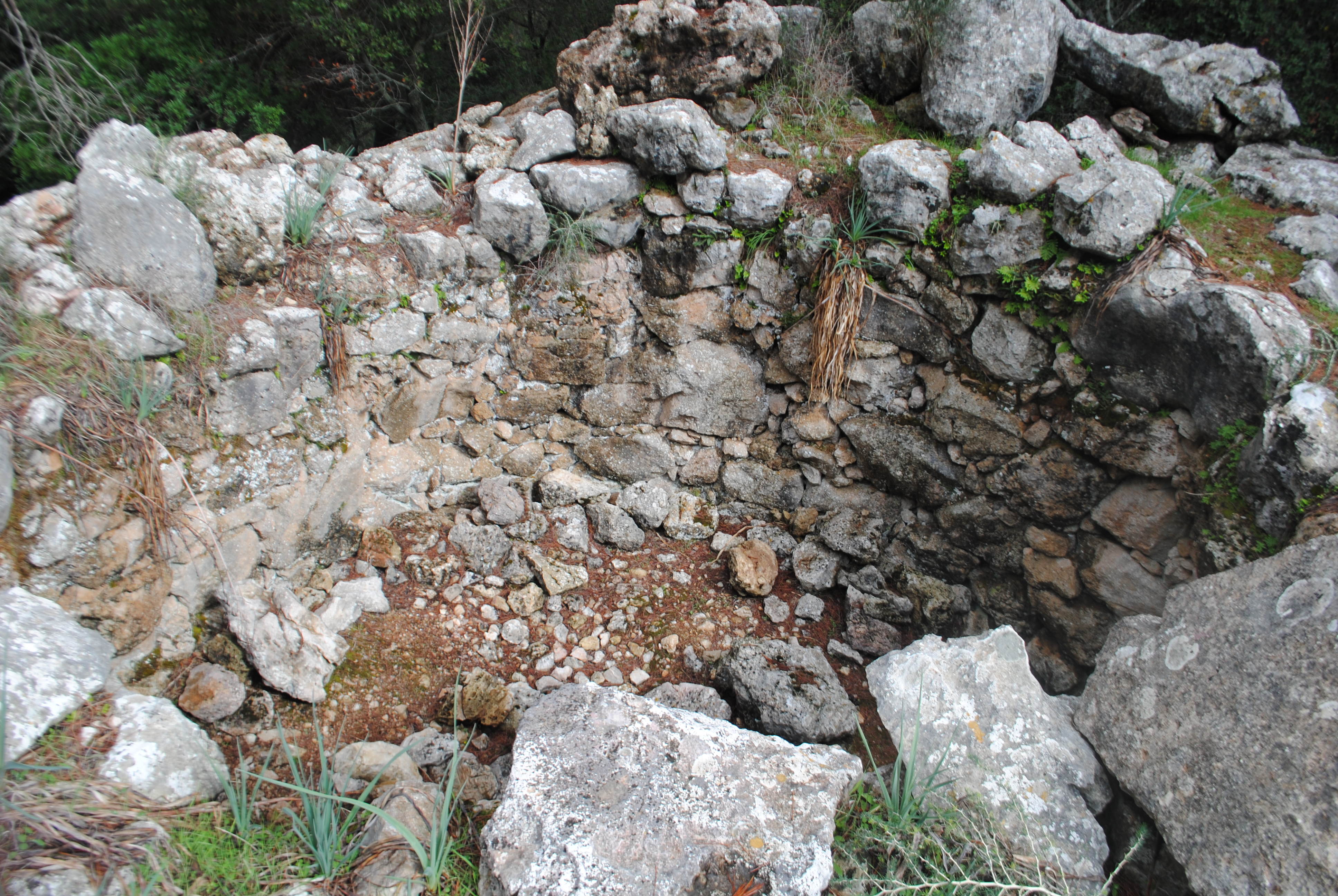 Cambra central del talaiot. Es veuen les restes del que podria ser el basament de la columna central.